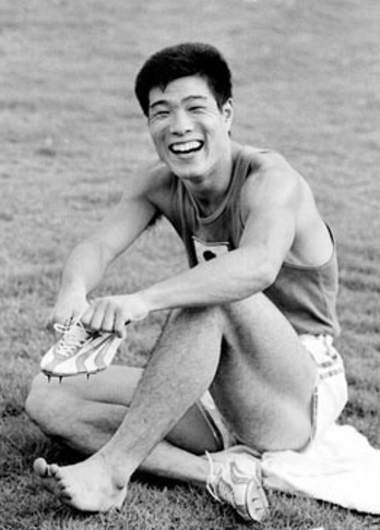 Hideo Iijima, 1964 Olympics